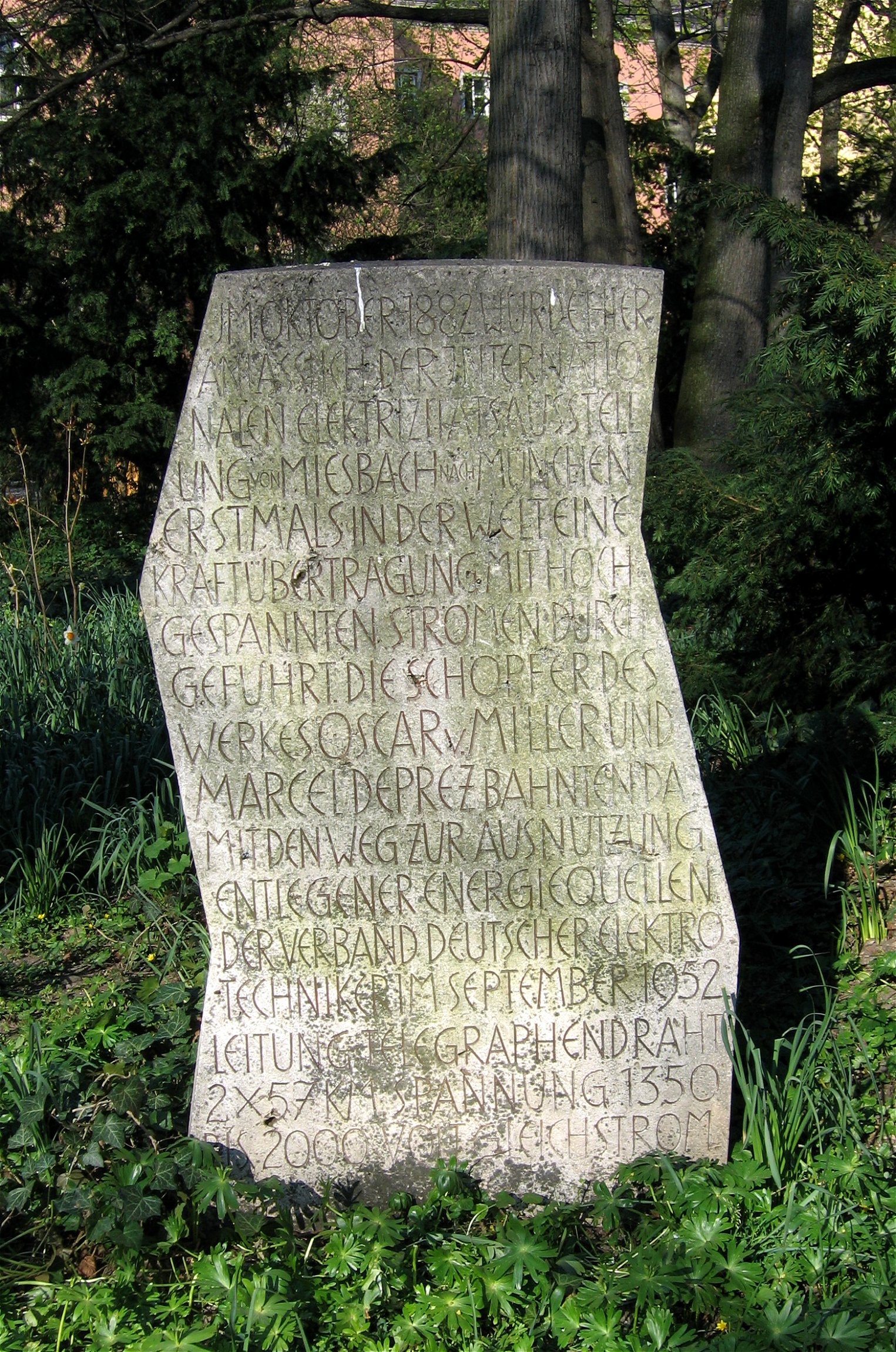 Gedenkstein an die erste Gleichstromfernübertragung (Miesbach-München) im Jahre 1882, Alter Botanischer Garten, München Text: Im Oktober 1882 wurde hier anlässlich der internationalen Elektrizitätsausstellung von Miesbach nach München erstmals in der Welt eine Kraftübertragung mit hochgespannten Strömen durchgeführt. Die Schöpfer des Werkes Oscar v. Miller und Marcel Deprez bahnten damit den Weg zur Ausnützung entlegener Energiequellen. Der Verband deutscher Elektrotechniker im September 1952. Leitung Telegraphendraht 2x57 Km, Spannung 1350 bis 2000 Volt Gleichstrom.